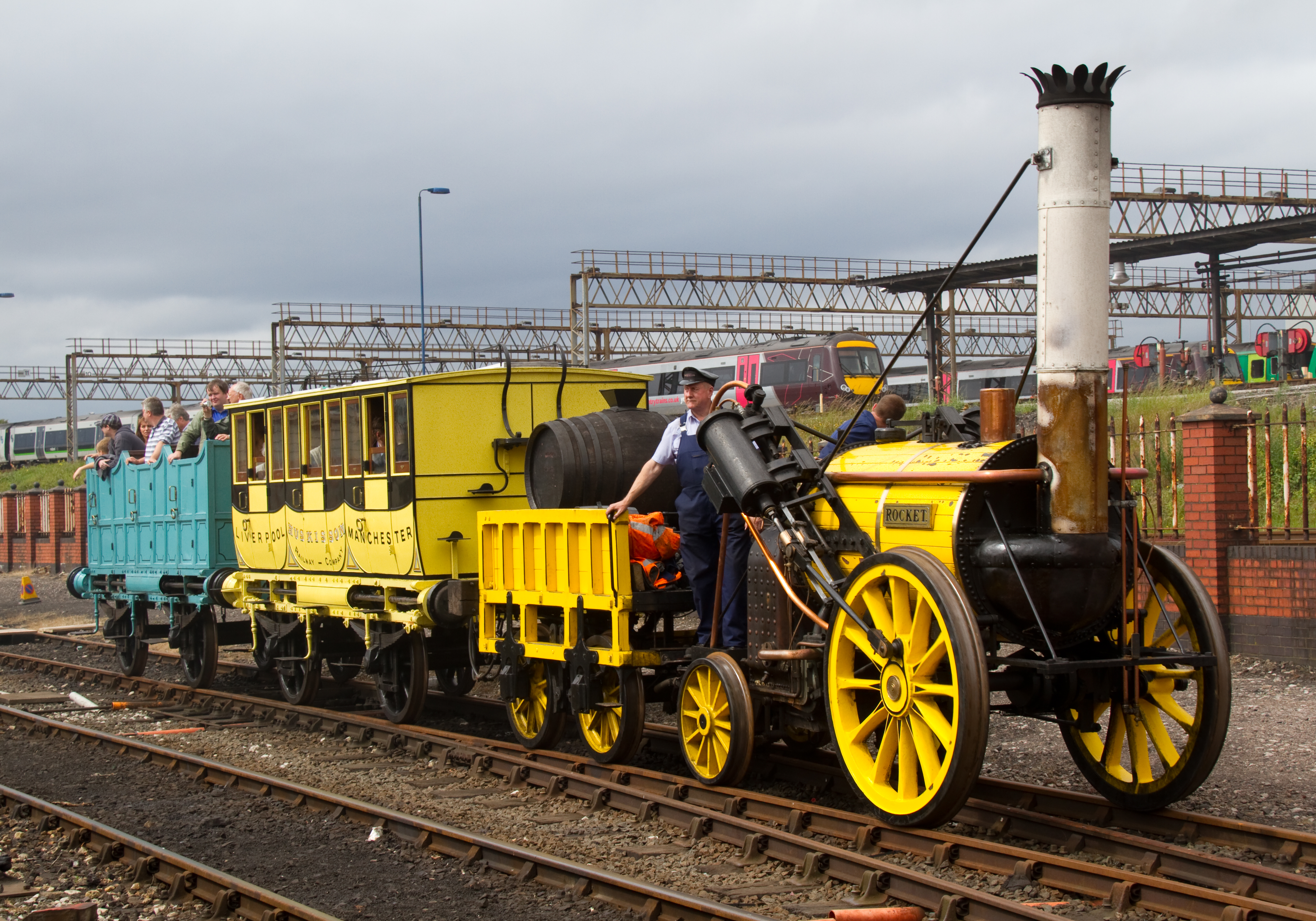 Rocket Tyseley 1